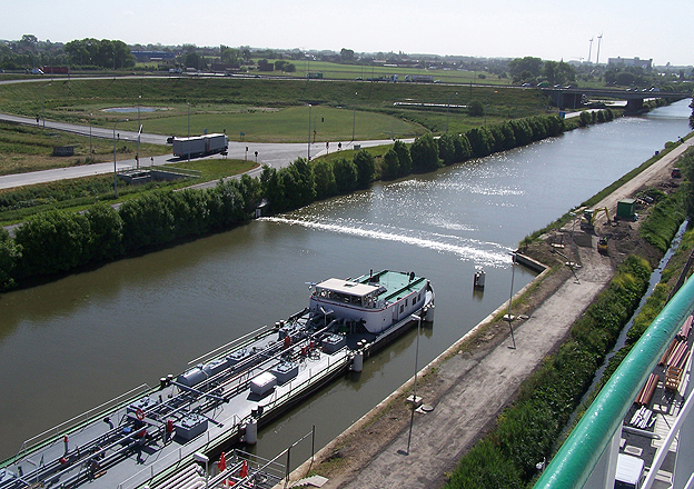 Druckluftsperre im Tanklager Roeselare, Belgien